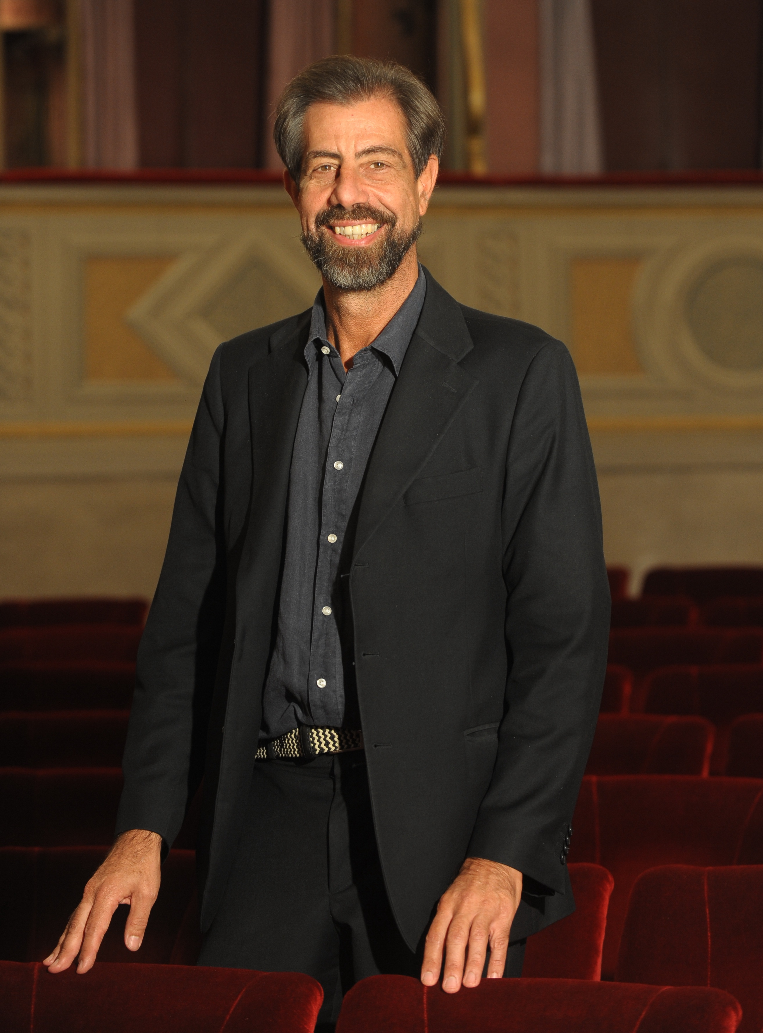 Luigi Giuliano Ceccarelli in uno scatto di Gianfranco Rota